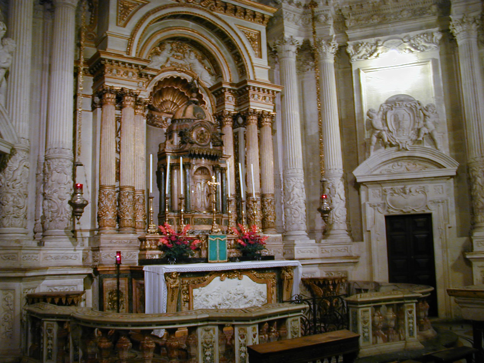 Altare - Cappella del Sacramento - Duomo di Siracusa